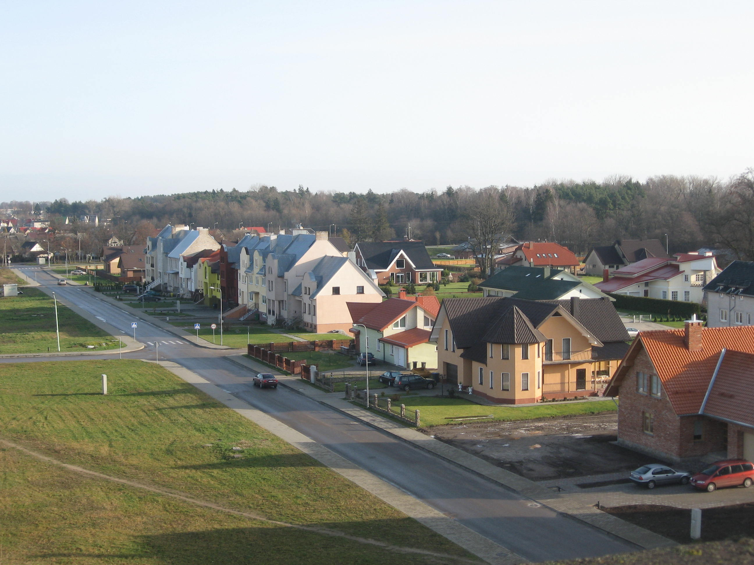 Šilutė